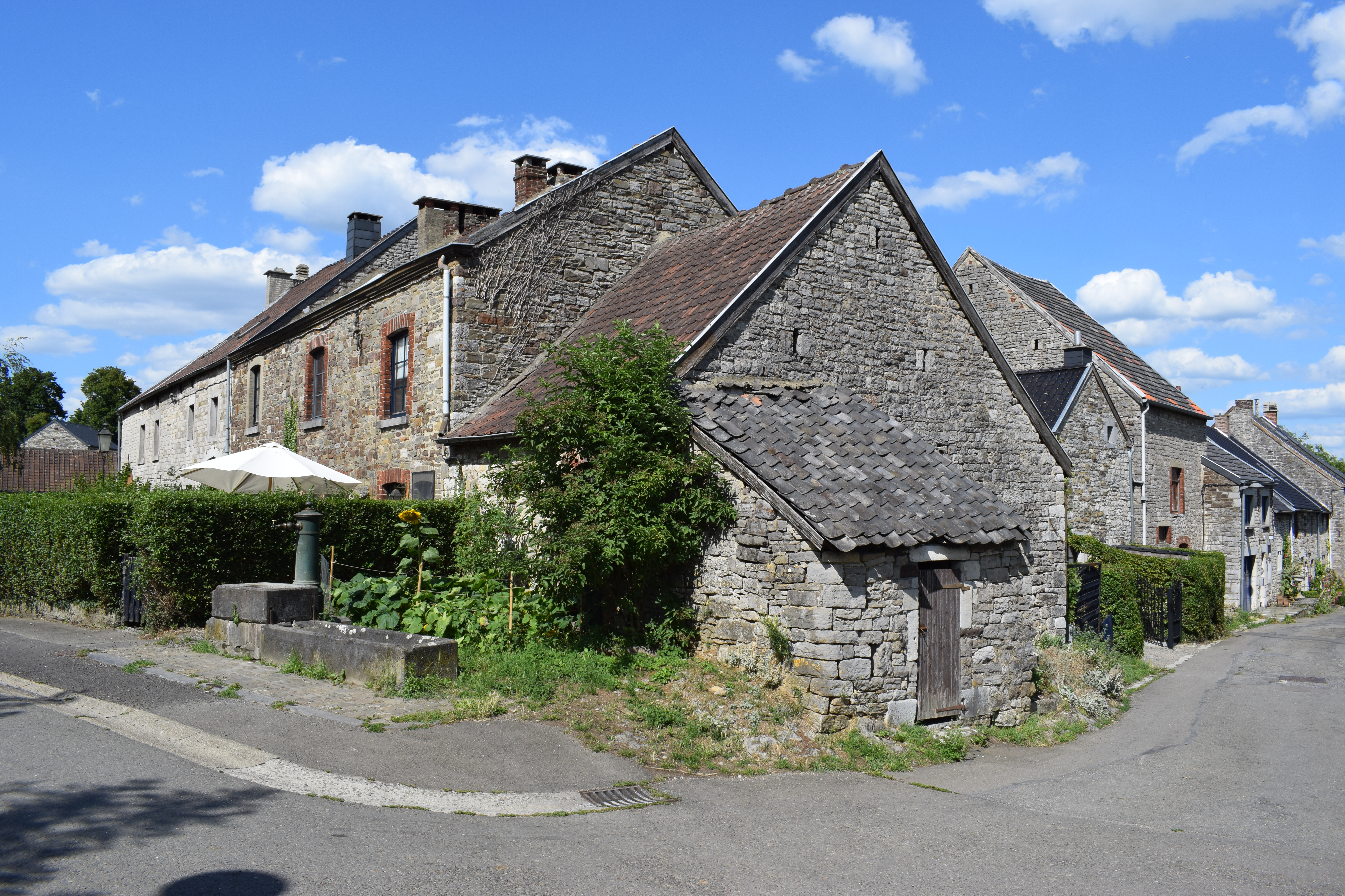 Vue du hameau de Ham, sur le plateau surplombant la boucle de l'Ourthe, entre Esneux et Hony (province de Liège, en Belgique).